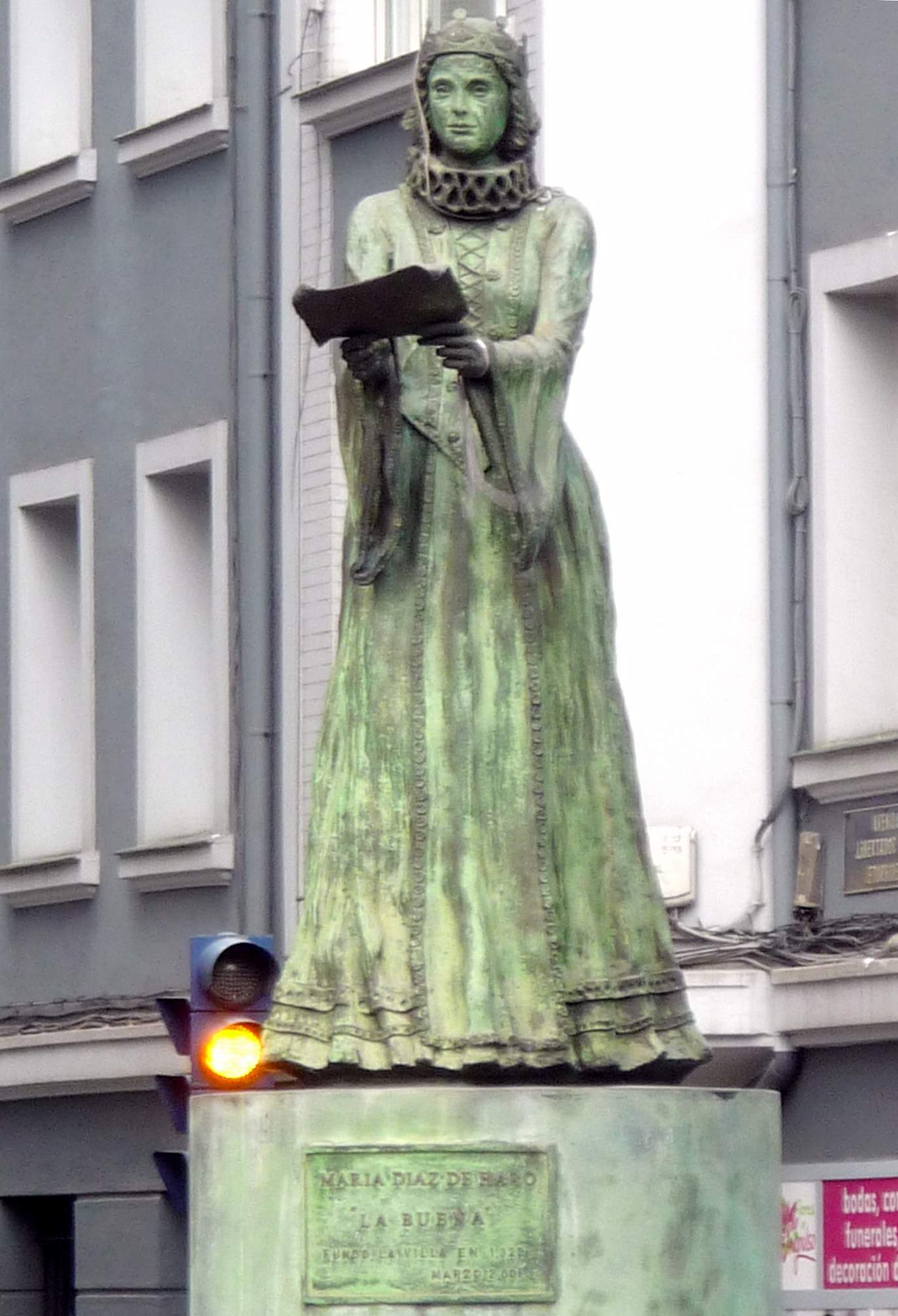 Monumento a María Díaz de Haro, 'La Buena', décima señora de Vizcaya, en Portugalete